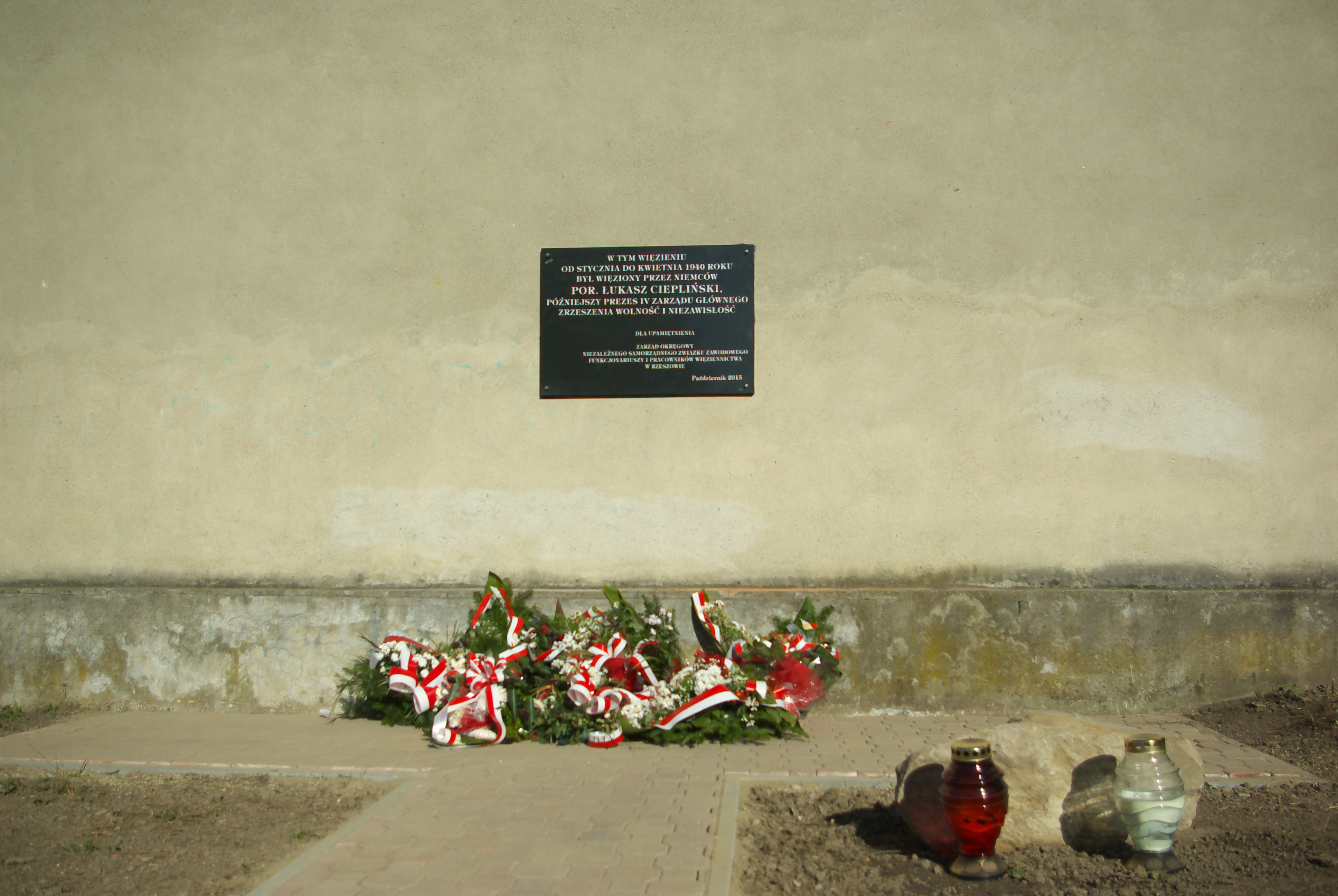 Tablica upamiętniająca Łukasza Cieplińskiego w Sanoku z 2015